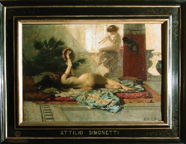 attrice pompeiana